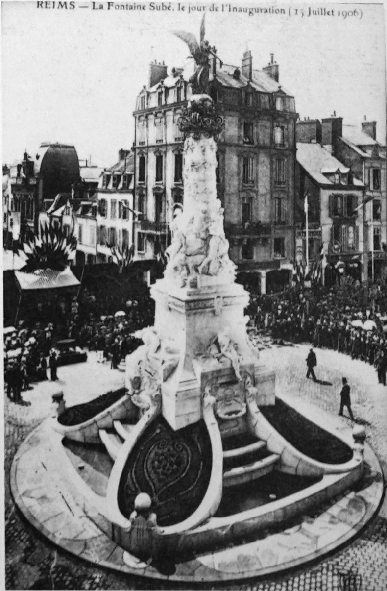 sur une vue ancienne.